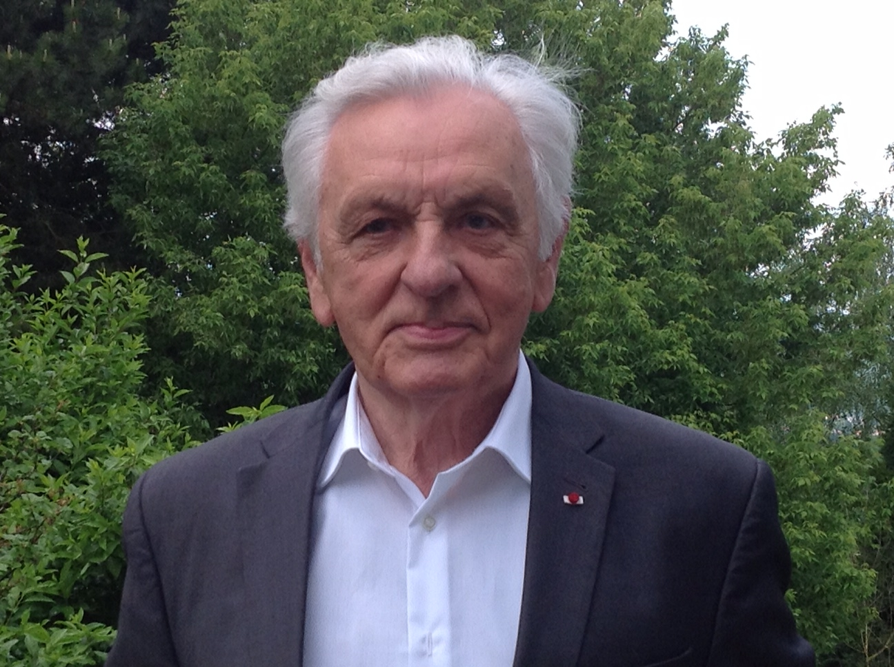 photo d'identité pour page personnelle